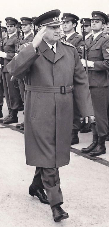 Prezident ČSSR, armádny generál Ľudvík Svoboda, v auguste v roku 1969, pri oslavách 25. výročia SNP v Banskej Bystrici, po vzdaní holdu, vykonáva prehliadku Čestnej stráže bratislavskej posádky (VÚ 3853/S).